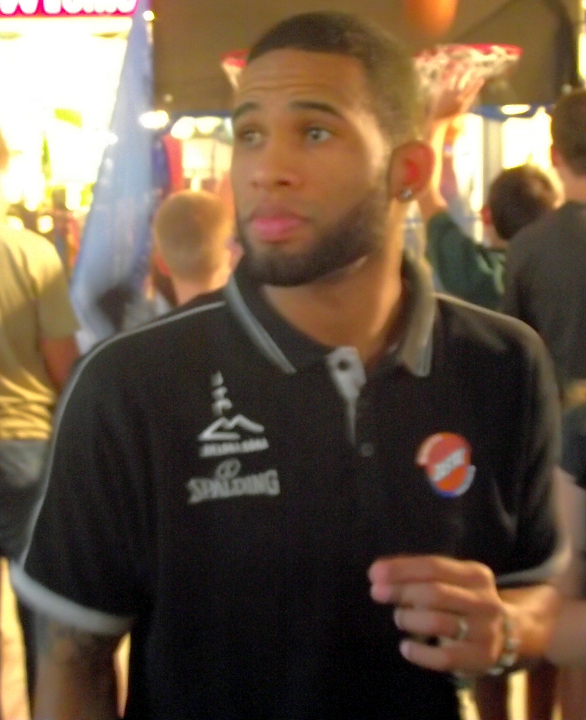 Walter Hodge podczas prezentacji Zastalu Zielona Góra przed sezonem 2011/2012.